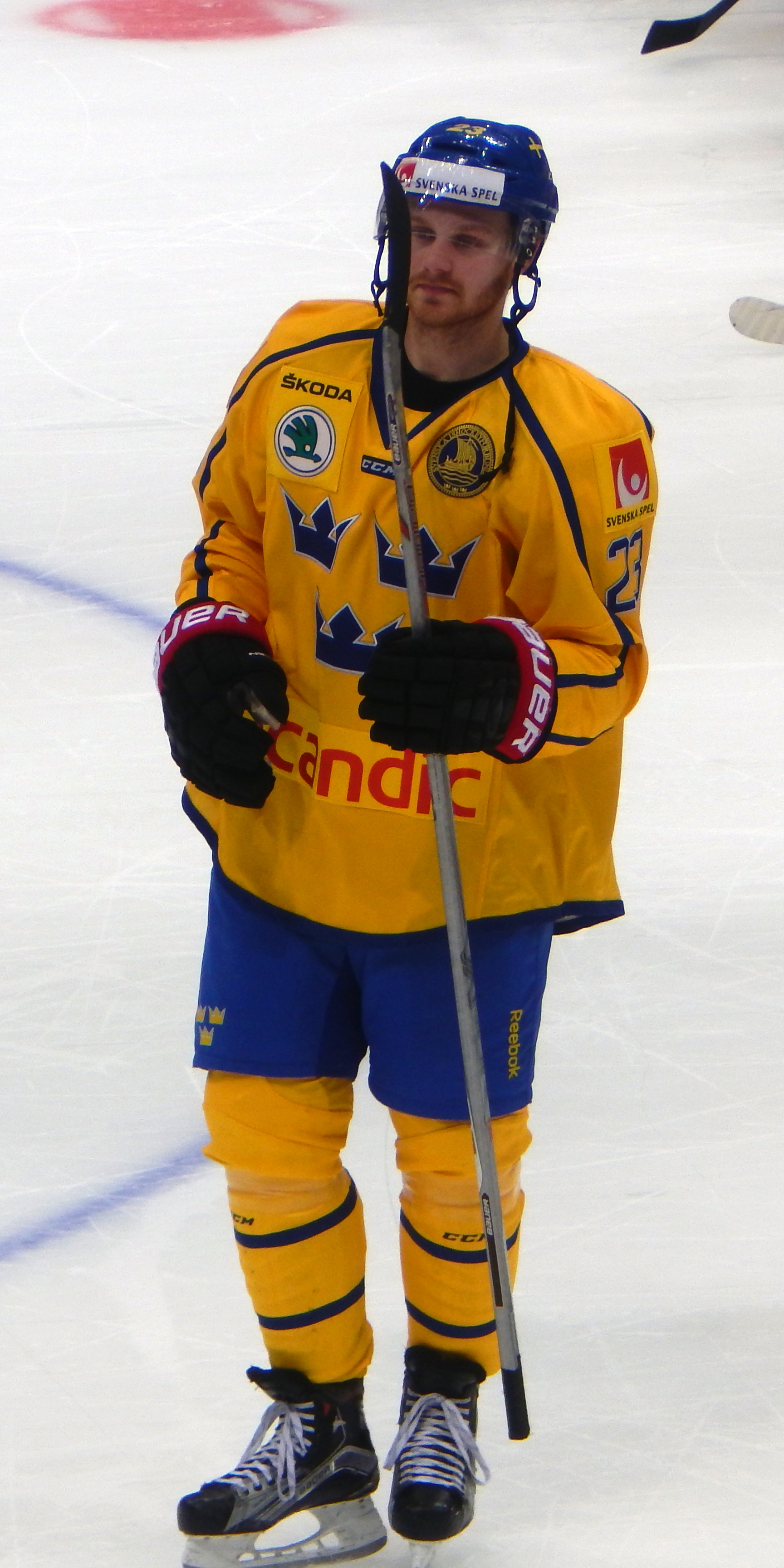 Лукас Воллмарк - лучший игрок матча между Швецией и Финляндией на Кубке Первого Канала 2015